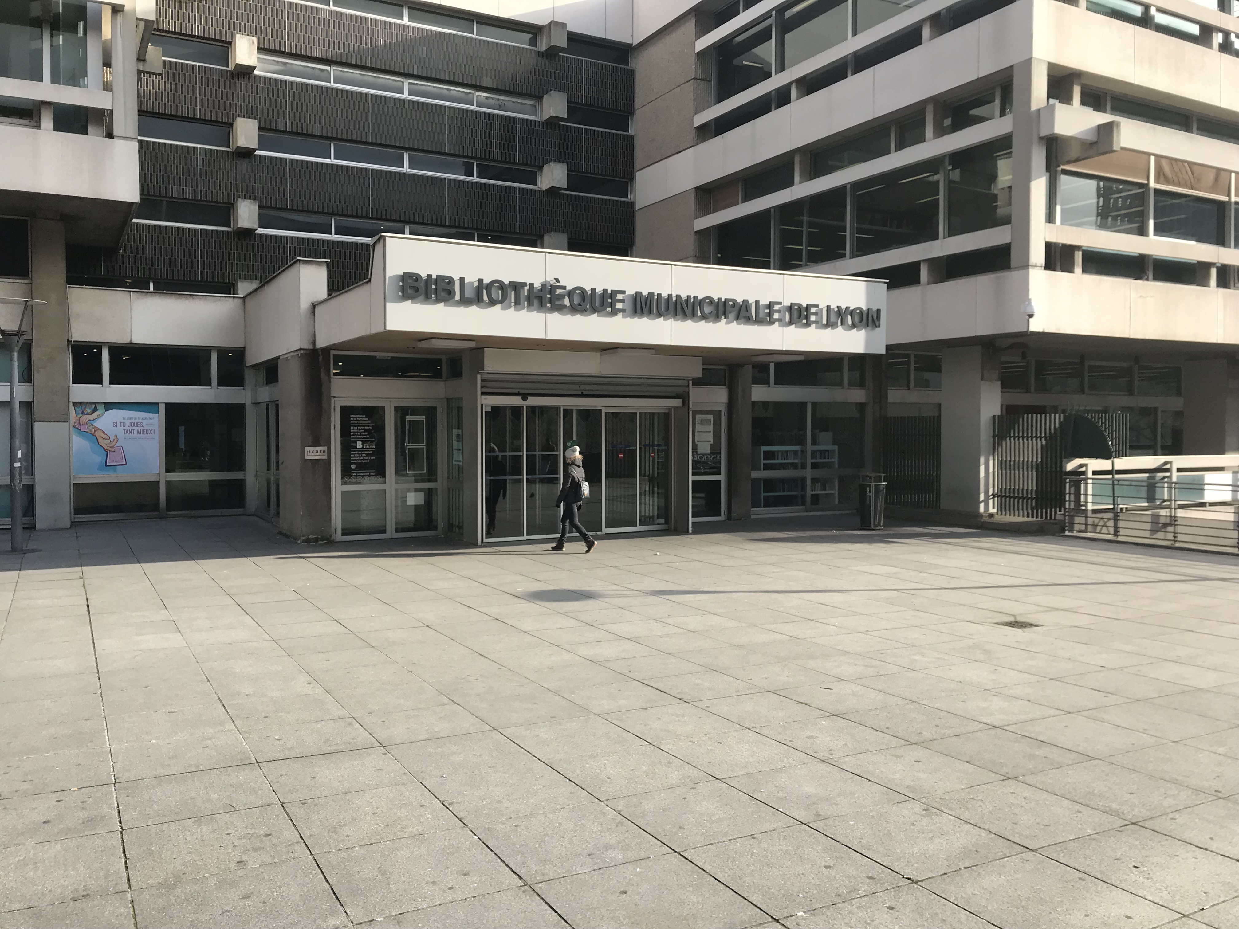 Une des entrées de la bibliothèque municipale de Lyon.